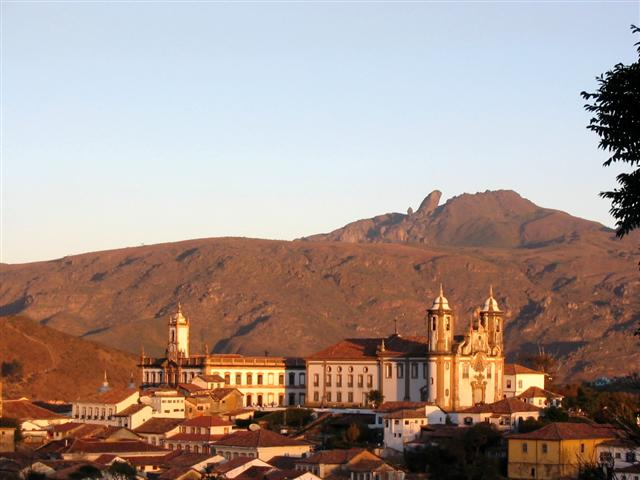 Vue d'Ouro Preto (Minas Gerais, Brésil) à la tombée du jour.